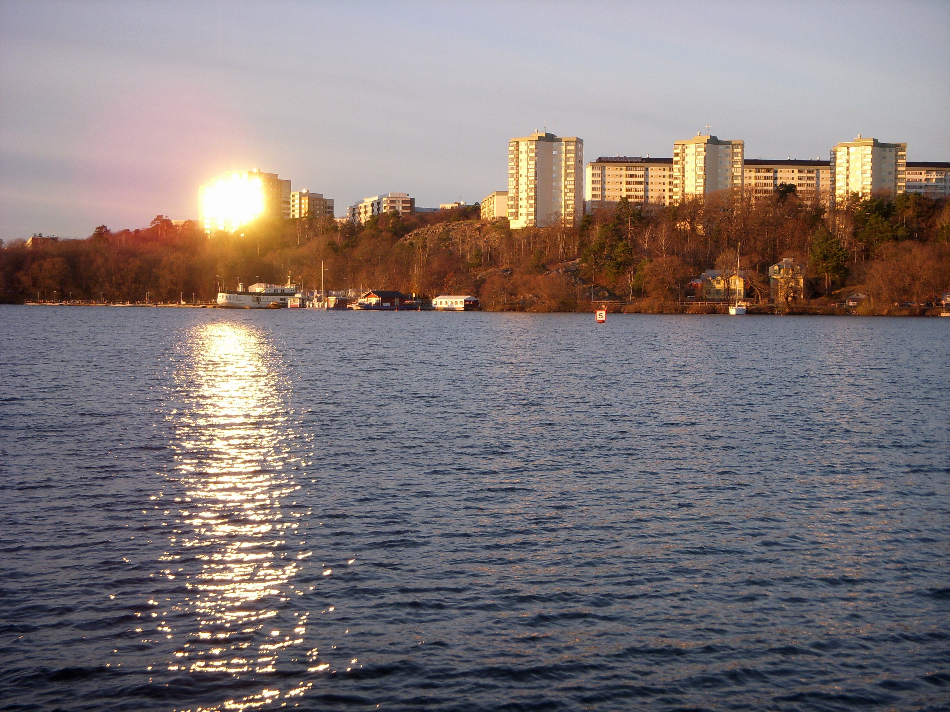 Bostadshusen i Västra skogen, Solna, vy över Ulvsundasjön